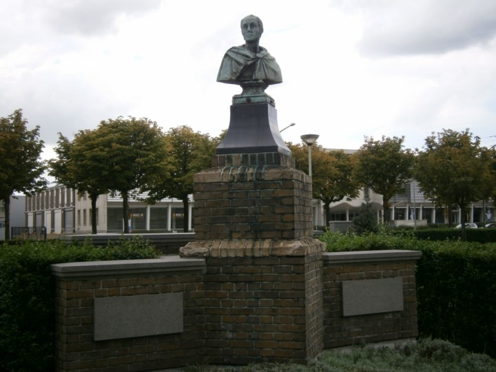 Buste van Simón Bolívar in de Venezuelastraat te Antwerpen.